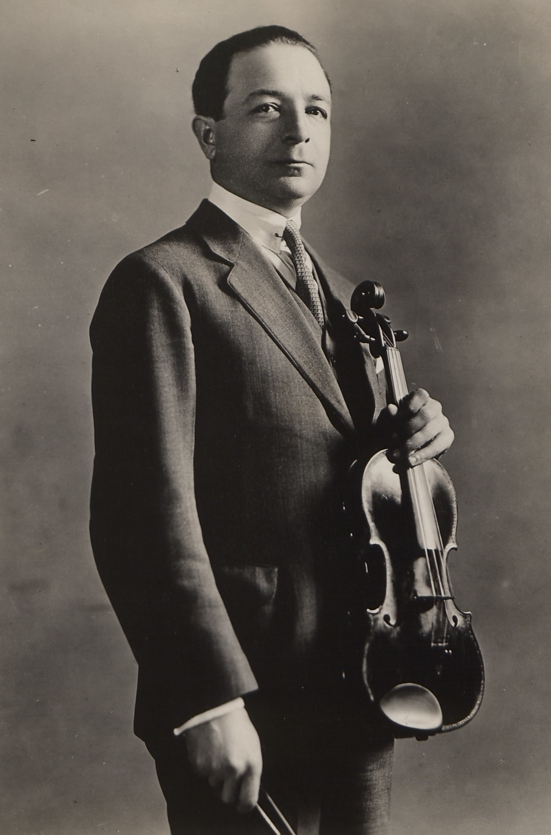 Portret Pawła Kochańskiego, ok. 1921 r.